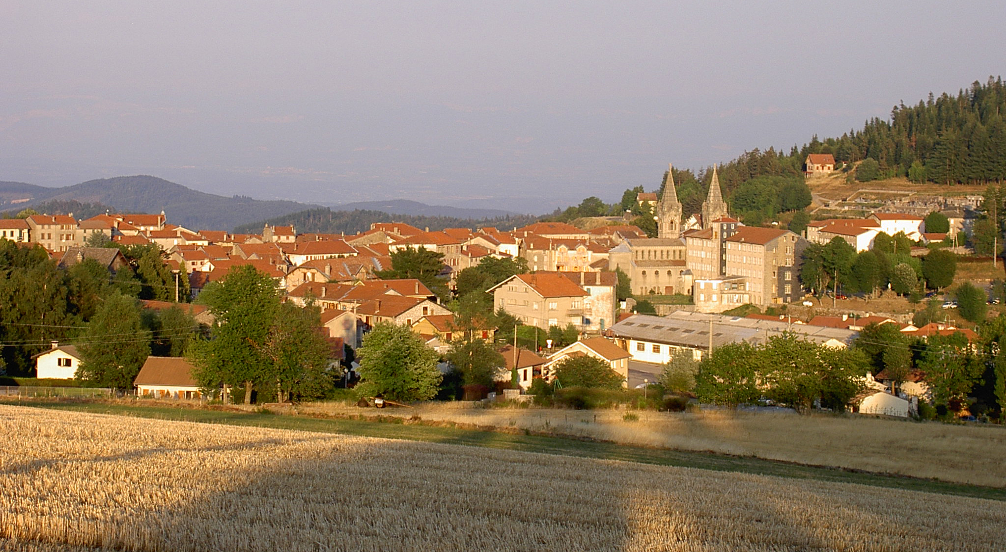 Vue générale de village de Lalouvesc